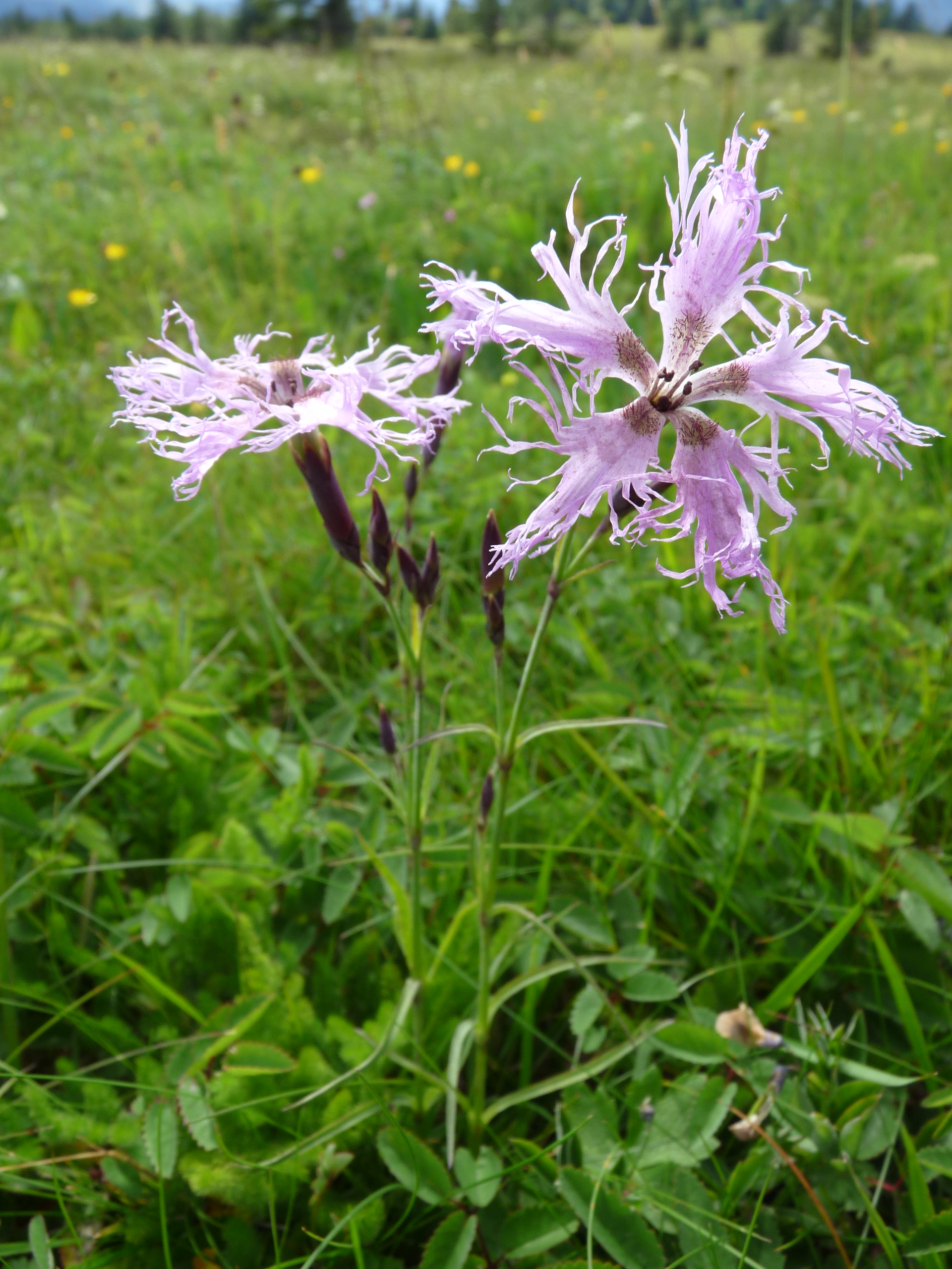 Œillet superbe au Gazon du Faing (Vosges)